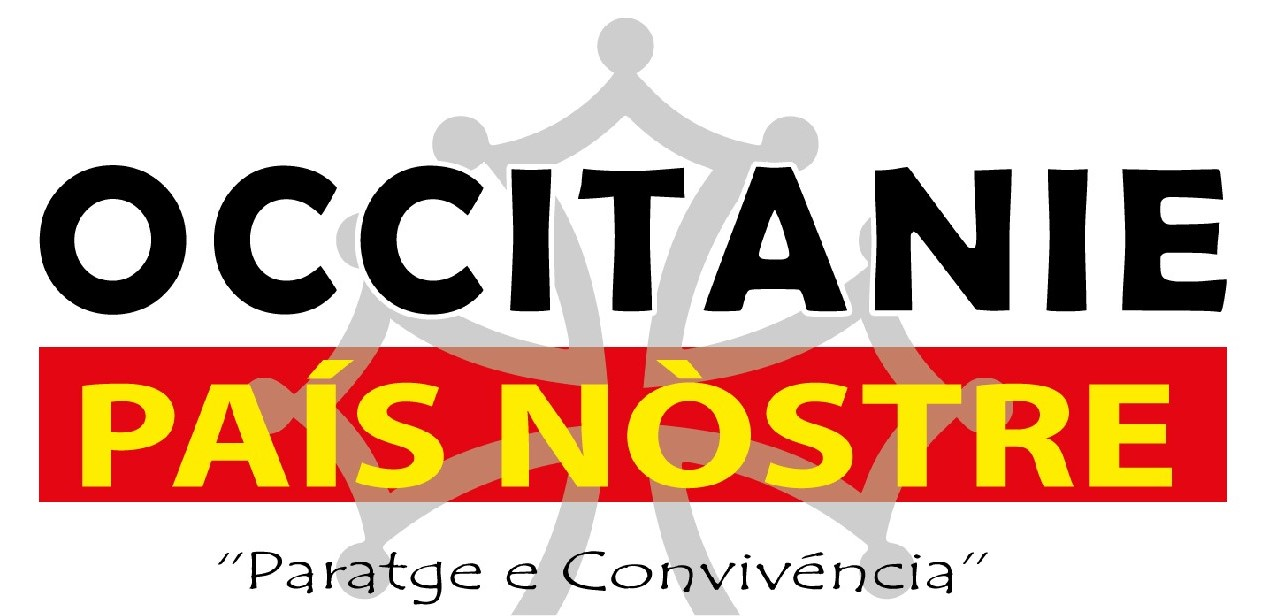 Logo Occitanie País Nòstre depuis novembre 2019